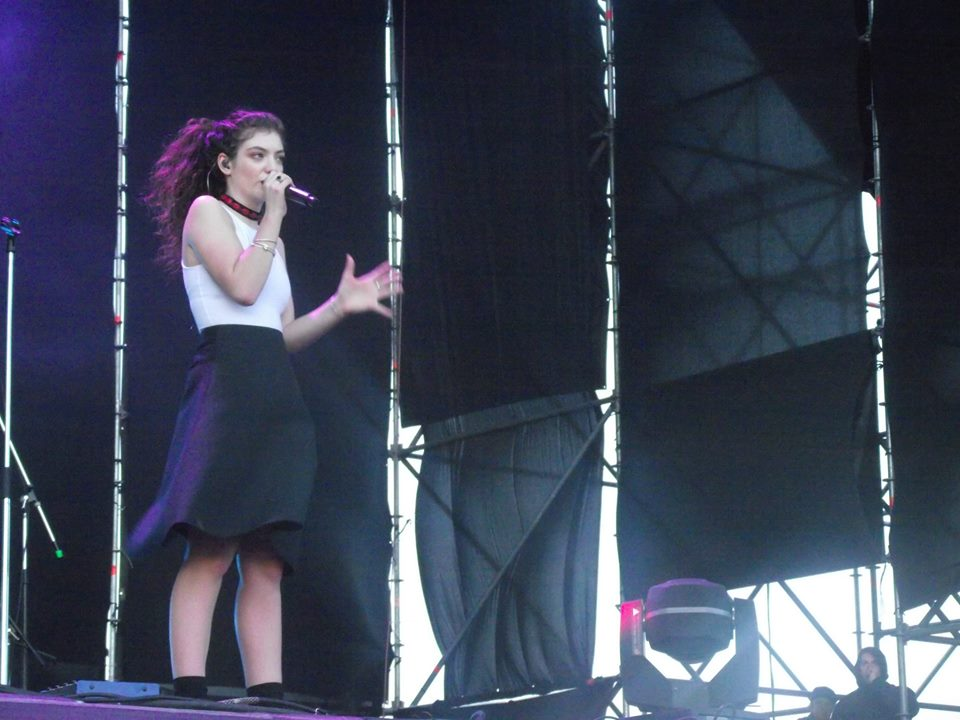 Imágenes tomadas por mi en el Lollapalooza Argentina